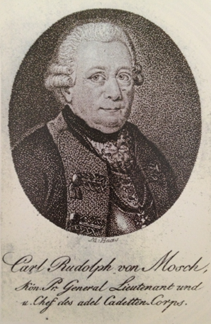 Carl Rudolph von Mosch (* 20. März 1718 in Altdorf bei Sagan; † 25. Juli 1798 in Berlin),königlich preußischer General-Lieutenant, Chef des adeligen Kadetten Corps und Ritter des Ordens pour le mérite